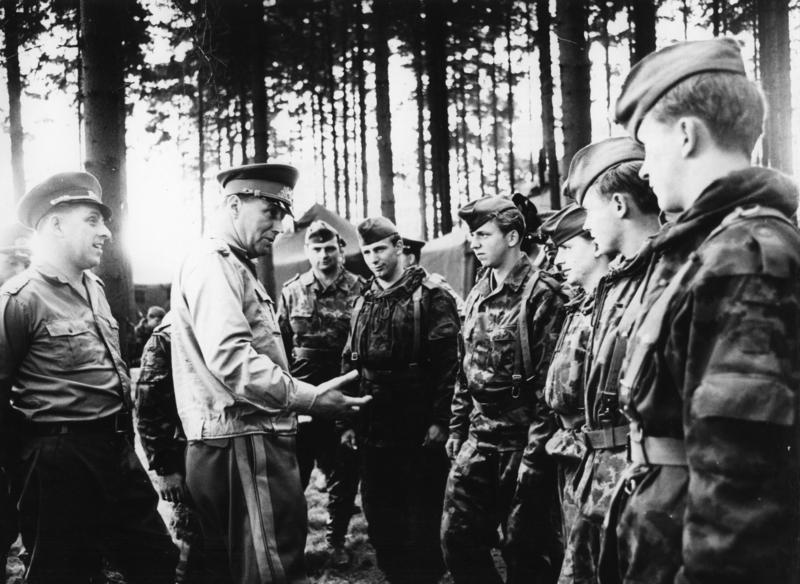 Siegfried Weiß bei NVA-Truppenbesuch Zentralbild / MBD / Hoepner / 5.9.1968 / Besuch bei Truppenteilen der NVA In den ersten Tagen des Septembers besuchte der Stellvertreter des Ministers für Nationale Verteidigung, Generalleutnant Siegfried Weiß, Einheiten und Truppenteile der NVA, die an den gemeinsamen Handlungen der Bruderarmeen zum Schutze der sozialistischen Errungenschaften in der CSSR teilnahmen. Die Soldaten, Unteroffiziere und Offiziere versicherten Armeegeneral Heinz Hoffmann sowie den Kampfgenossen aller anderen Verbände und Truppenteile der NVA, daß sie den ihnen übertragenen Kampfauftrag in Ehren erfüllen werden. (Nur für Sperrarchiv) 2607/6 [MBD] Abgebildete Personen: : Stellvertretender Minister für Nationale Verteidigung, Generalleutnant der Nationalen Volksarmee (NVA), DDR Information added by Wikimedia users.